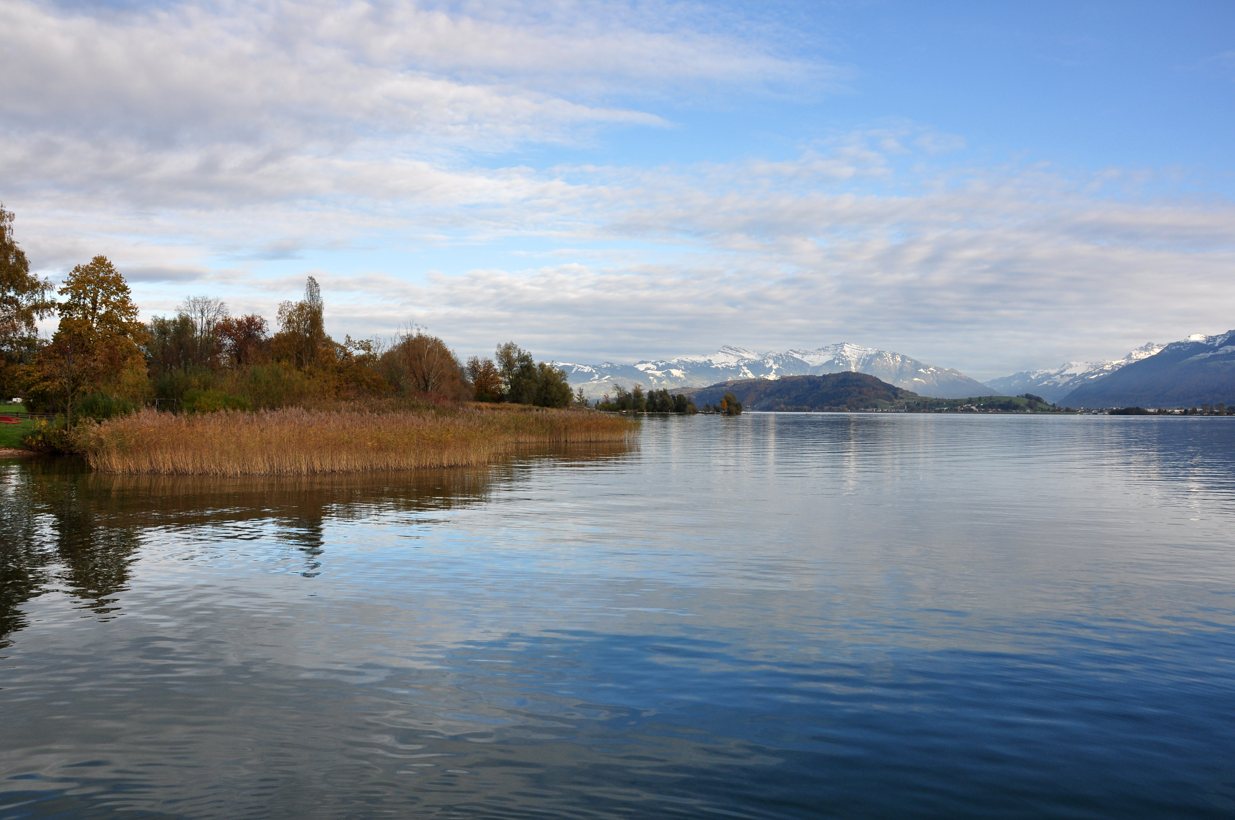 Obersee (upper Lake Zürich), as seen from Stampf in Jona (Switzerland)